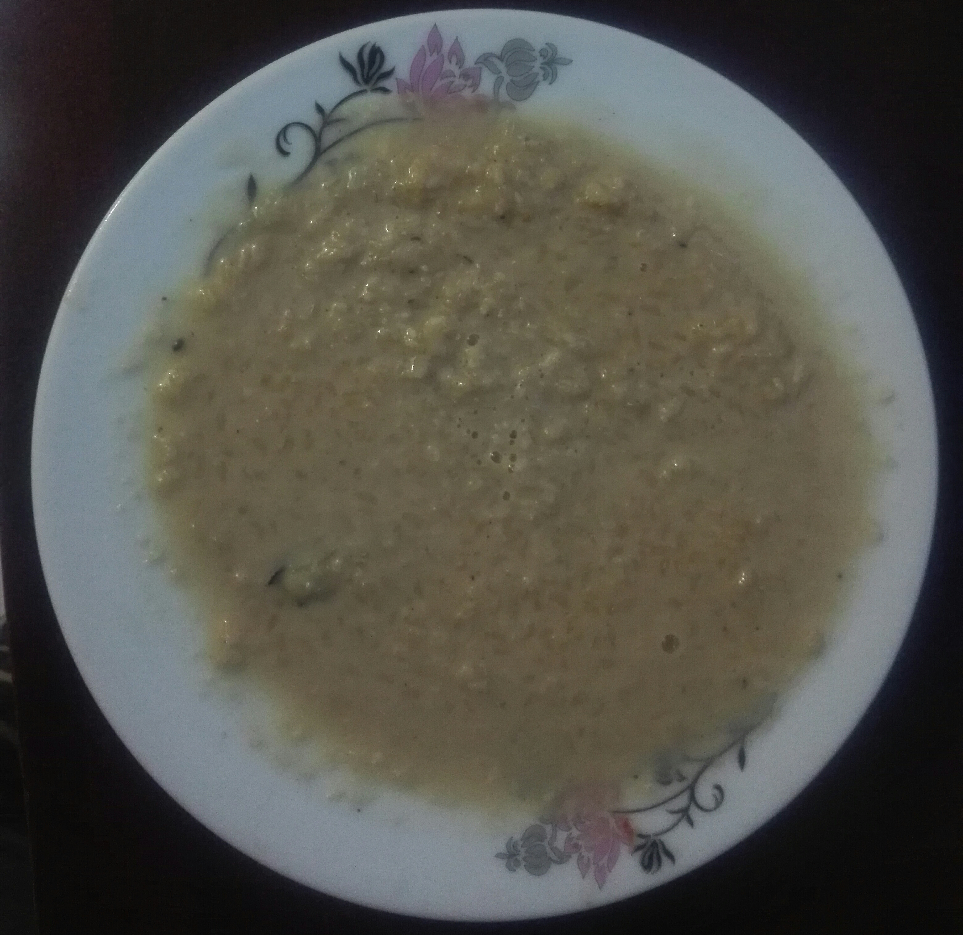 khejur gurer payes